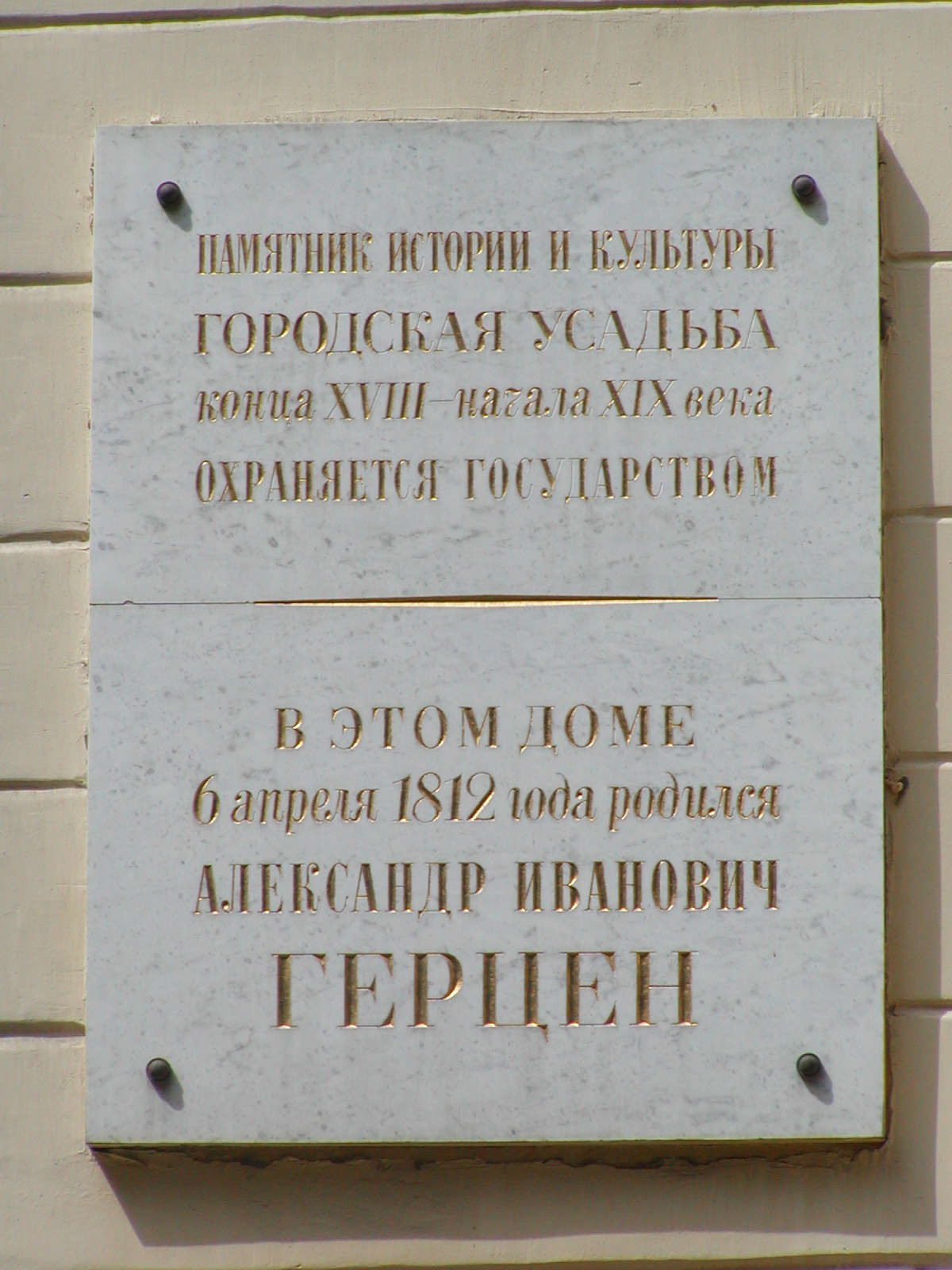 Мемориальная доска Александру Ивановичу Герцену в Литературном институте имени Горького в Москве.